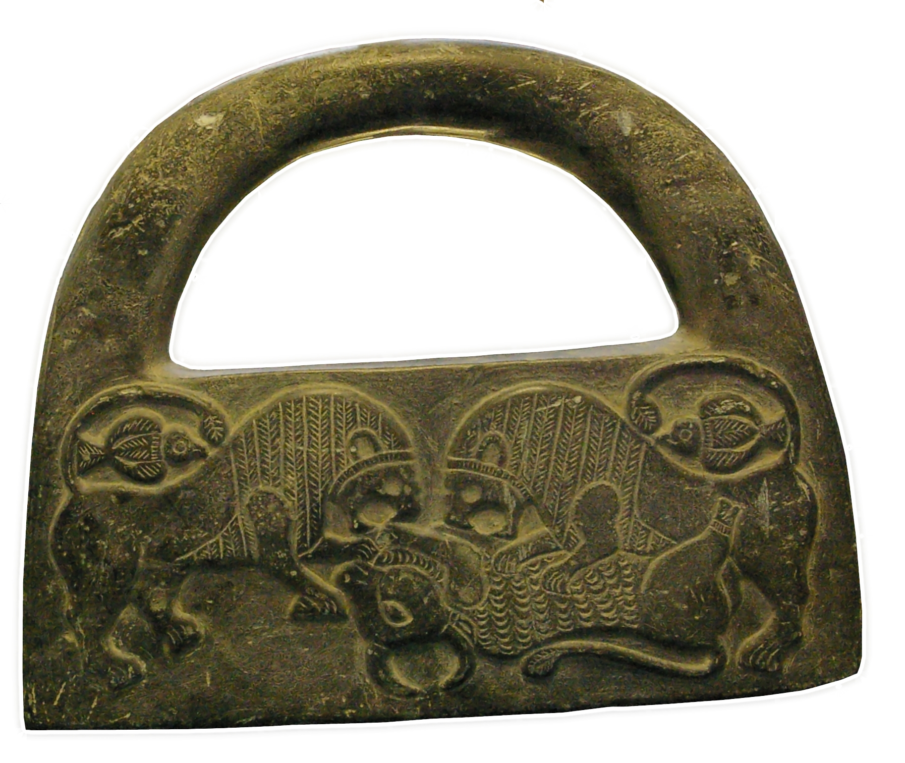 Azerbaijan Museum, Tabriz (Iran). Rock weight, Jiroft, 3rd mil. BC Azerbaijan Museum in Tabriz, Iran